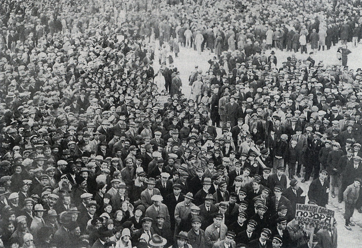 Протестна демонстрация срещу Ньойския договор